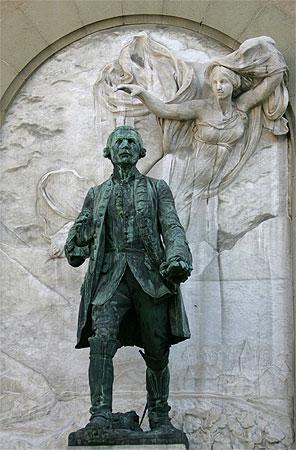 Lausanne: Jean Daniel Abraham Davel (Major Davel)